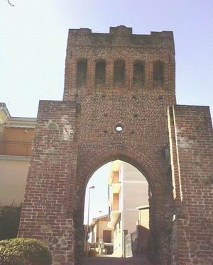 Torre medioevale a Beinasco (provincia di Torino)